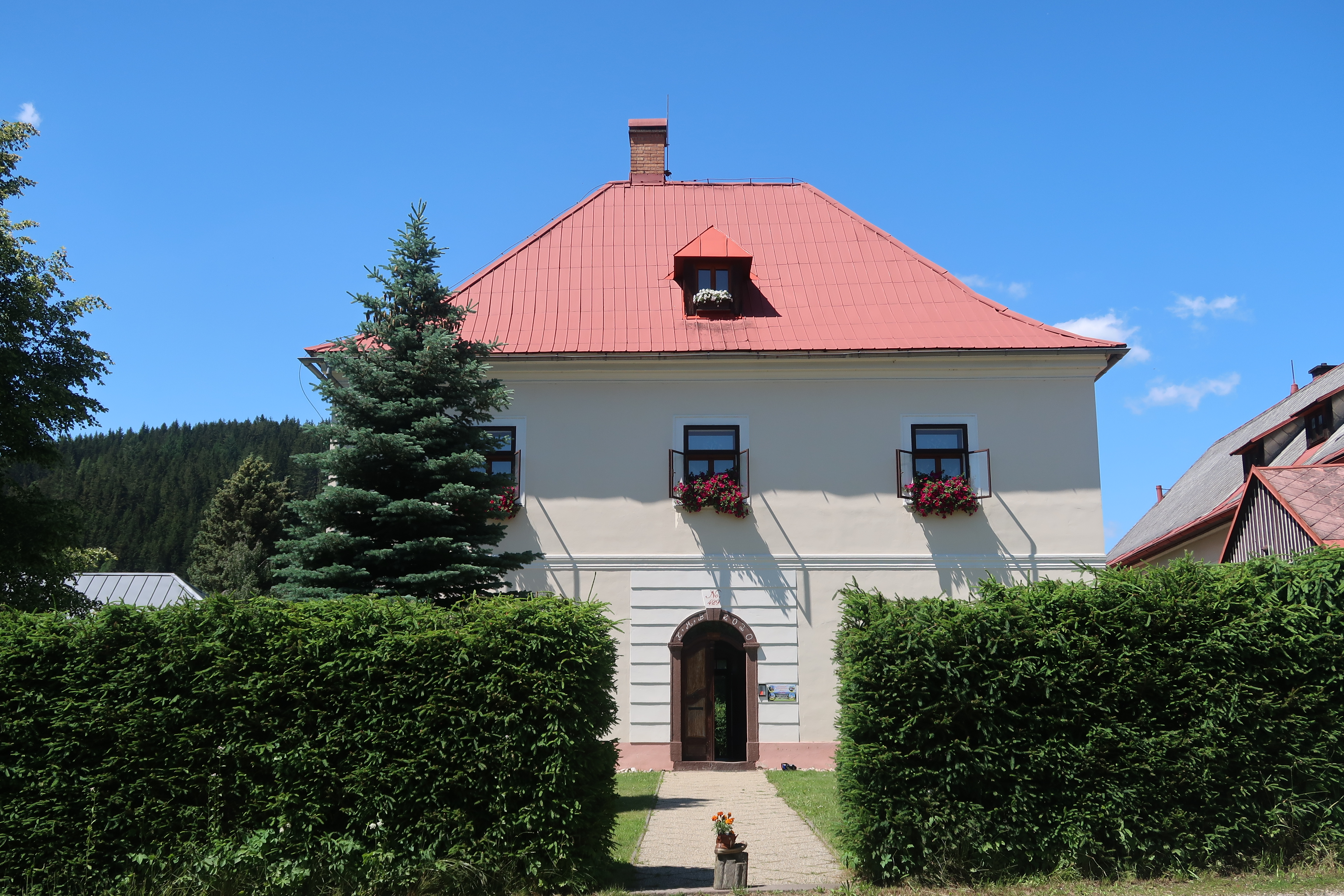 Farní úřad (1813) v Jablonci nad Jizerou